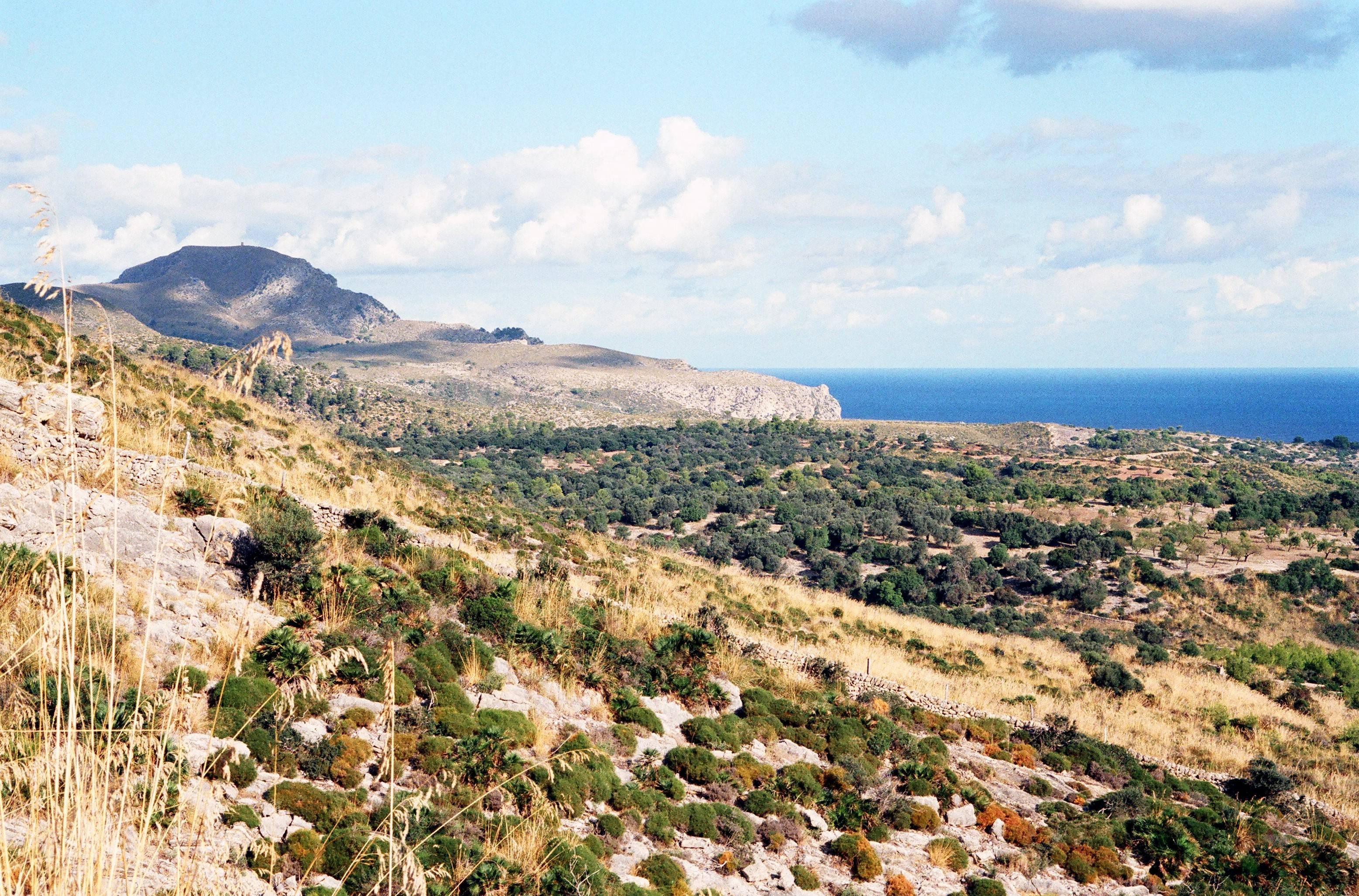 Nordostküste mit dem Talaia de Moreia und dem Küstenfelsen Penya Roja